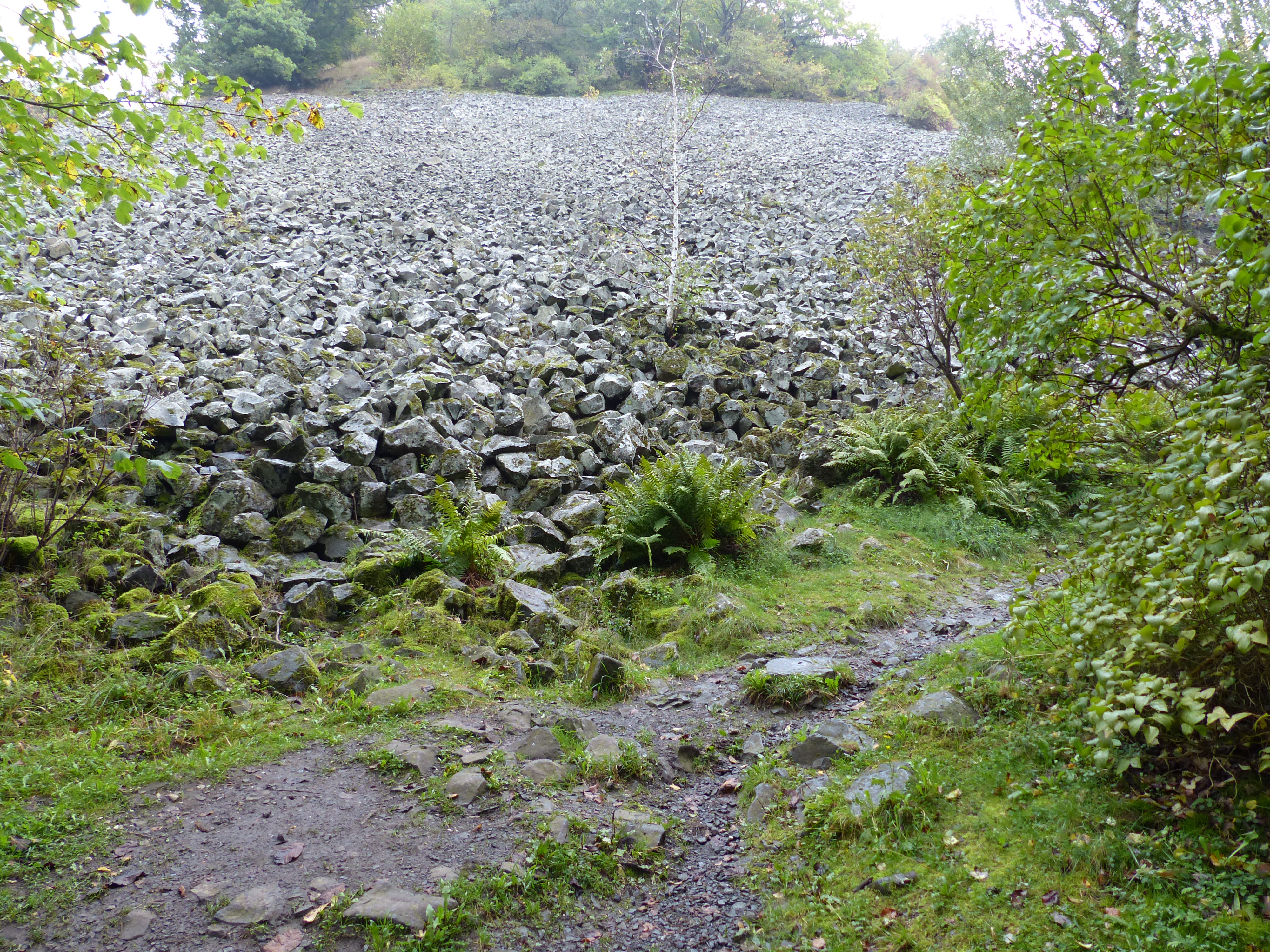 Rauher Kulm